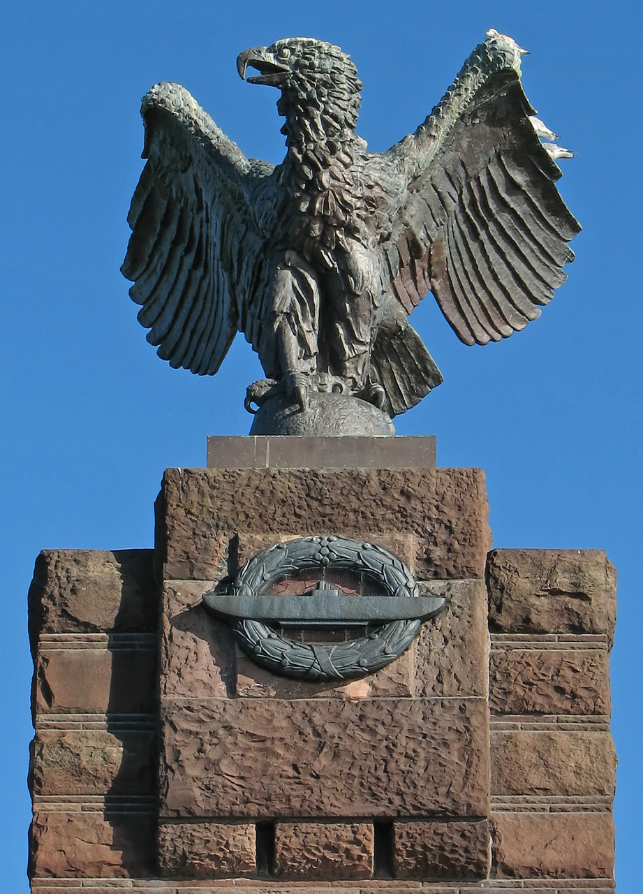 Beschreibung: U-Boot-Ehrenmal Möltenort / Heikendorf Gedankestätte für die gefallenen Ubootfahrer der deutschen Marine Fotograf: Darkone, 3. September 2005